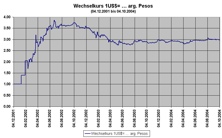 Wechselkurs des argentinischen Peso zum US-Dollar, Zeitraum: 4.12.2001 (kurz vor der Abwertung und Verlassen der Dollarbindung) und dem 04.10.2004